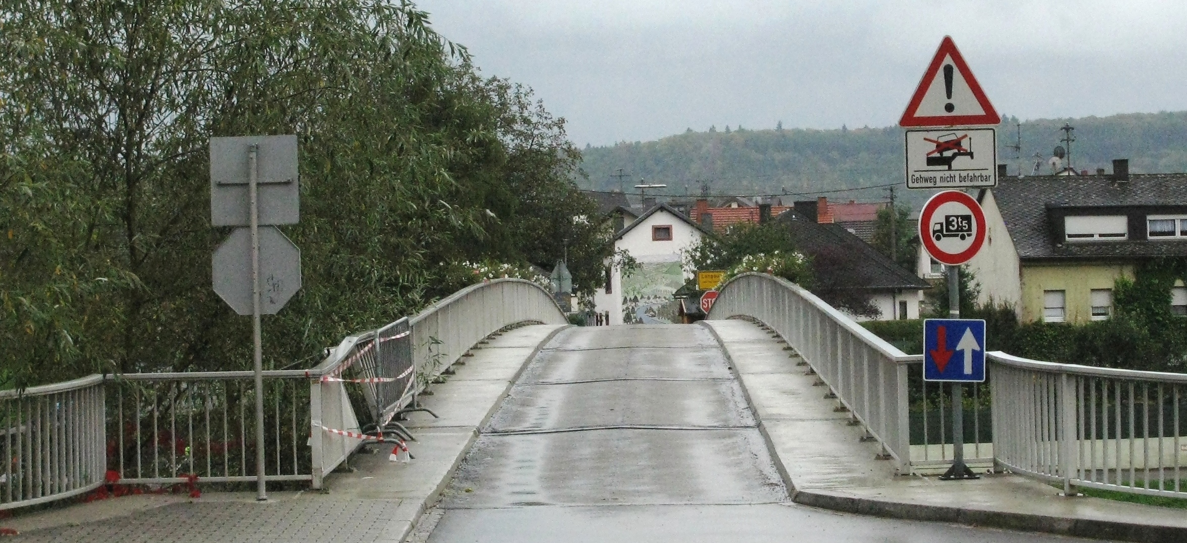 Bréck Laser.